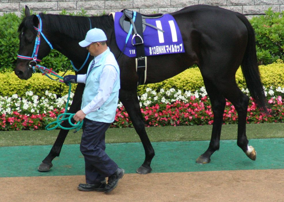 ゴスホークケン（東京競馬場）